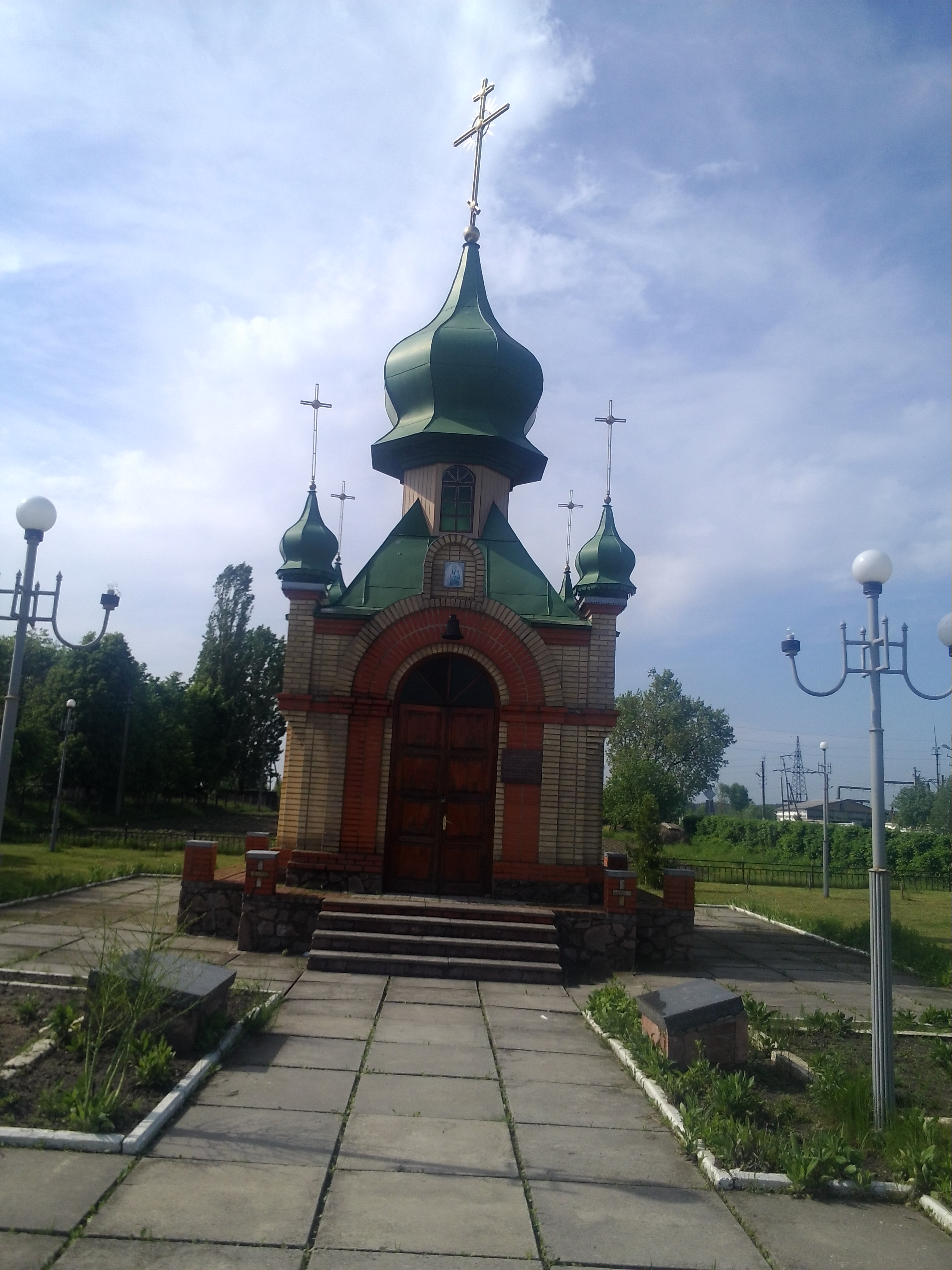 Меморіальний комплекс в Красятичах